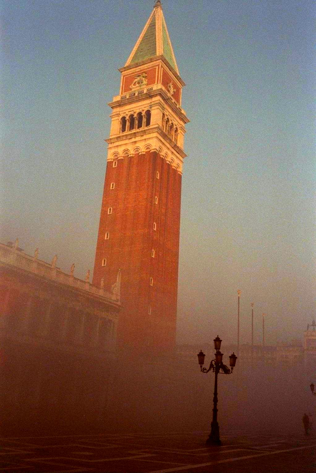 Il campanile di San Marco a Venezia